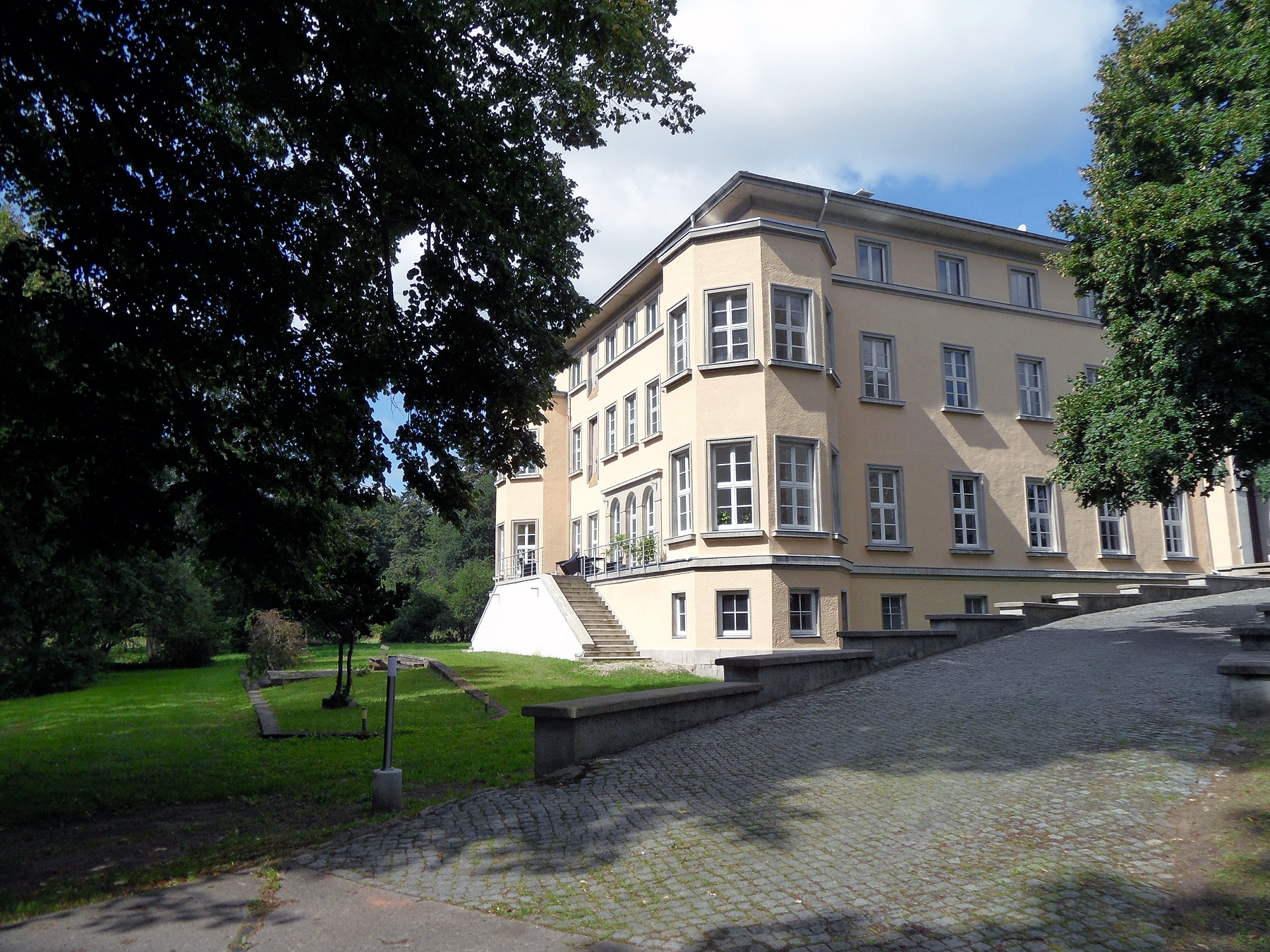 Schloss Vogelsang in Vorpommern (Teilansicht) Datum: 20.08.2011 Urheber: onnola (Flickr-User) Quelle